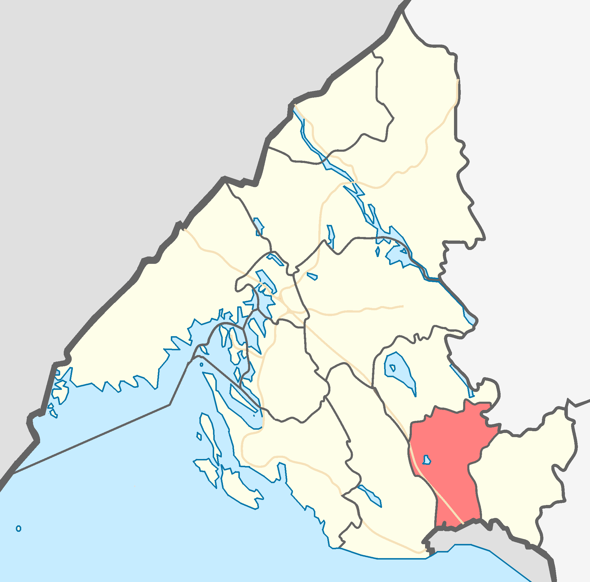 МО Рощинское городское поселение на карте Выборгского района Ленинградской области